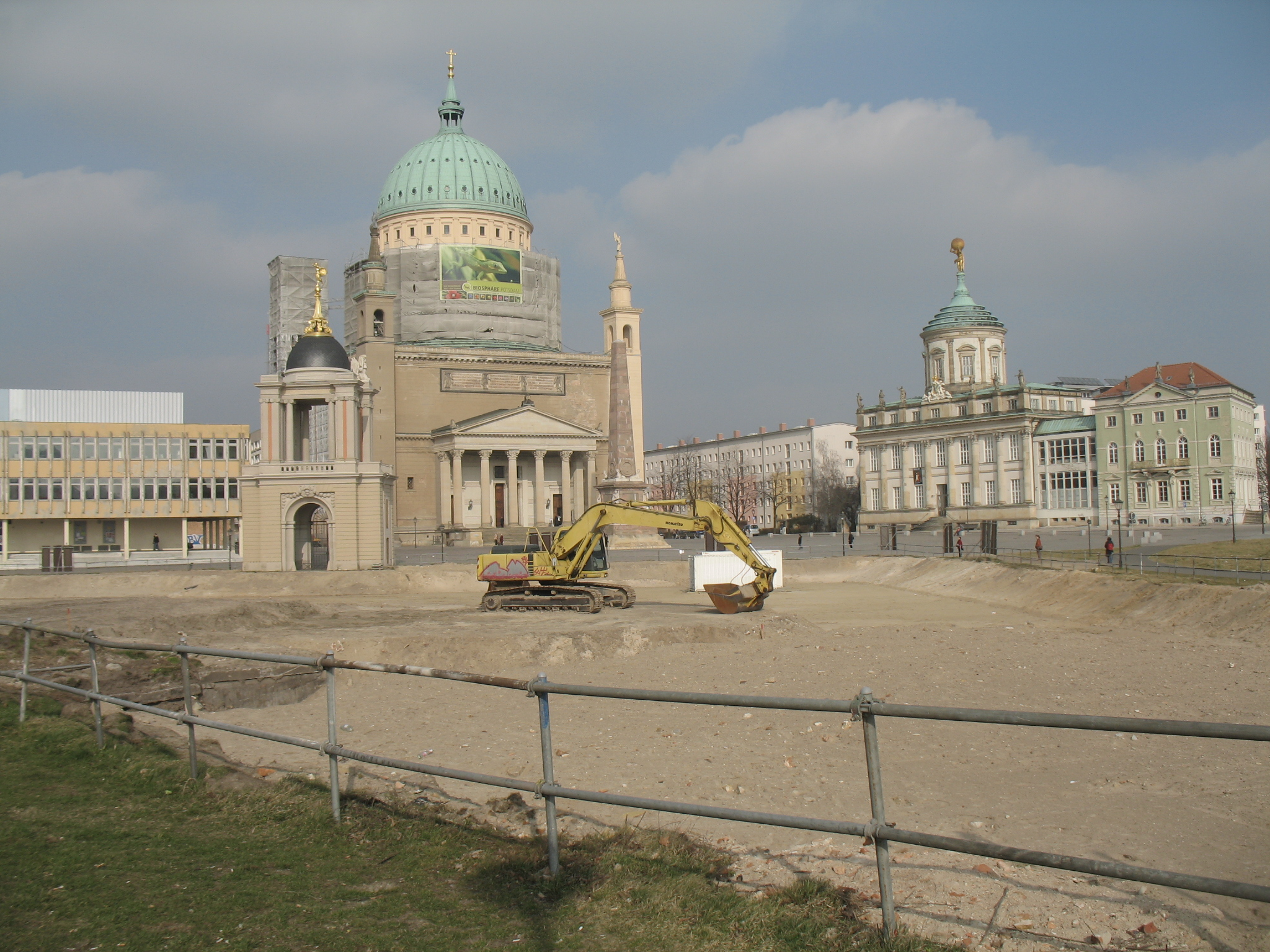 Das Fortunaportal mit den ersten Vorbereitungsarbeiten für den Bau des neuen Brandenburger Landtages ab 2009 Urheber: Florian S.